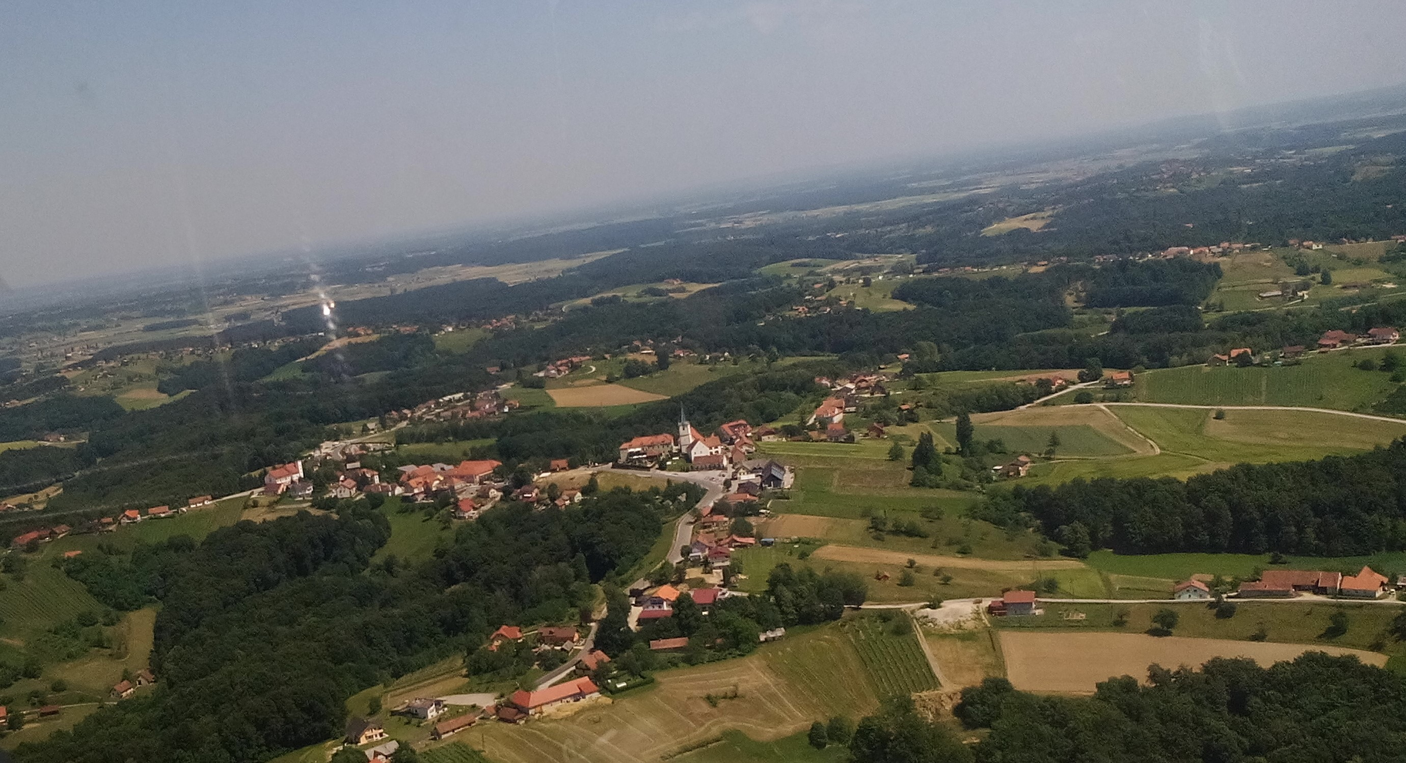 Cerkvenjak iz zraka, slikani iz zahodne strani